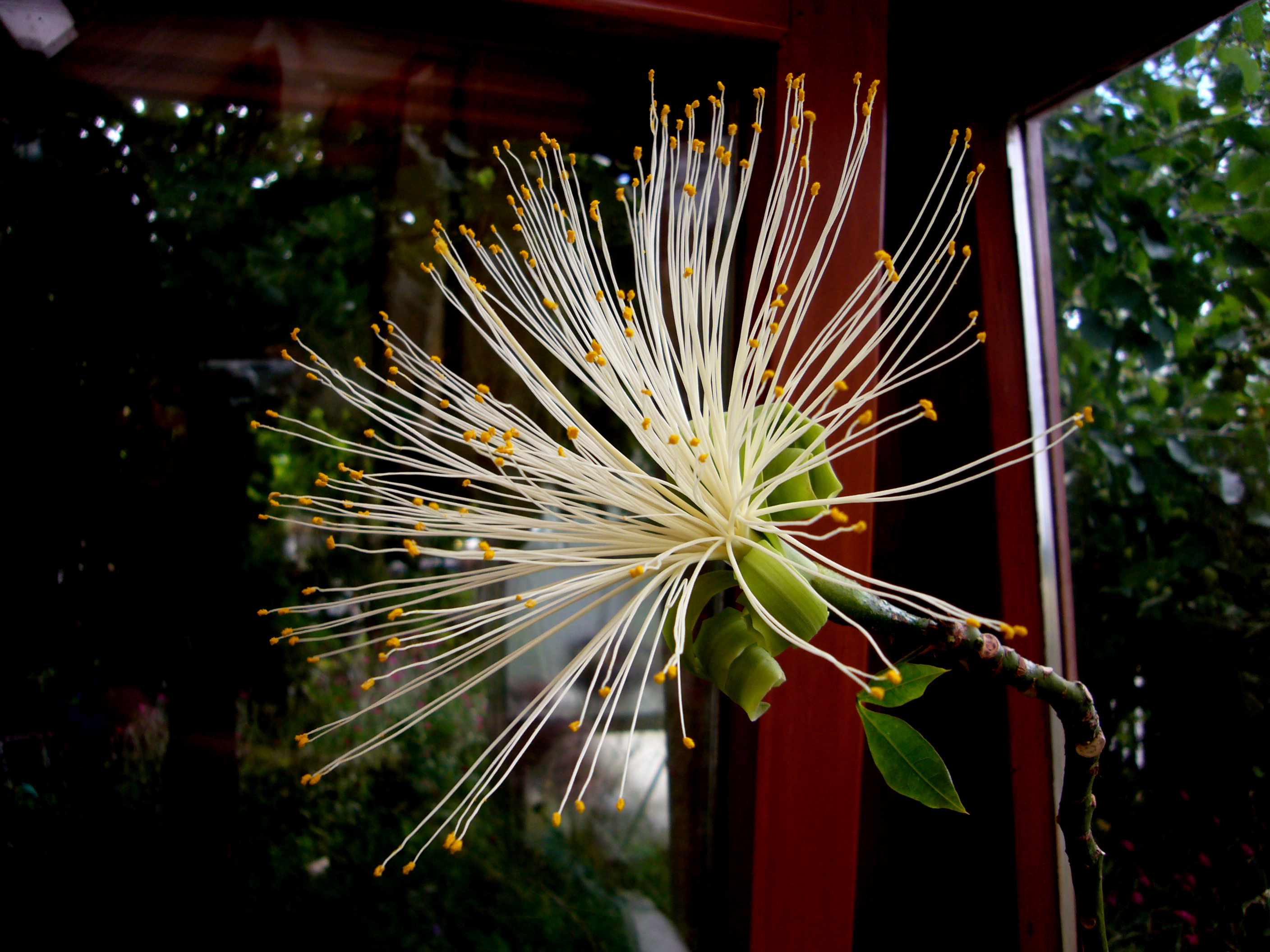 blühende Pachira in meinem Wintergarten in Bayern